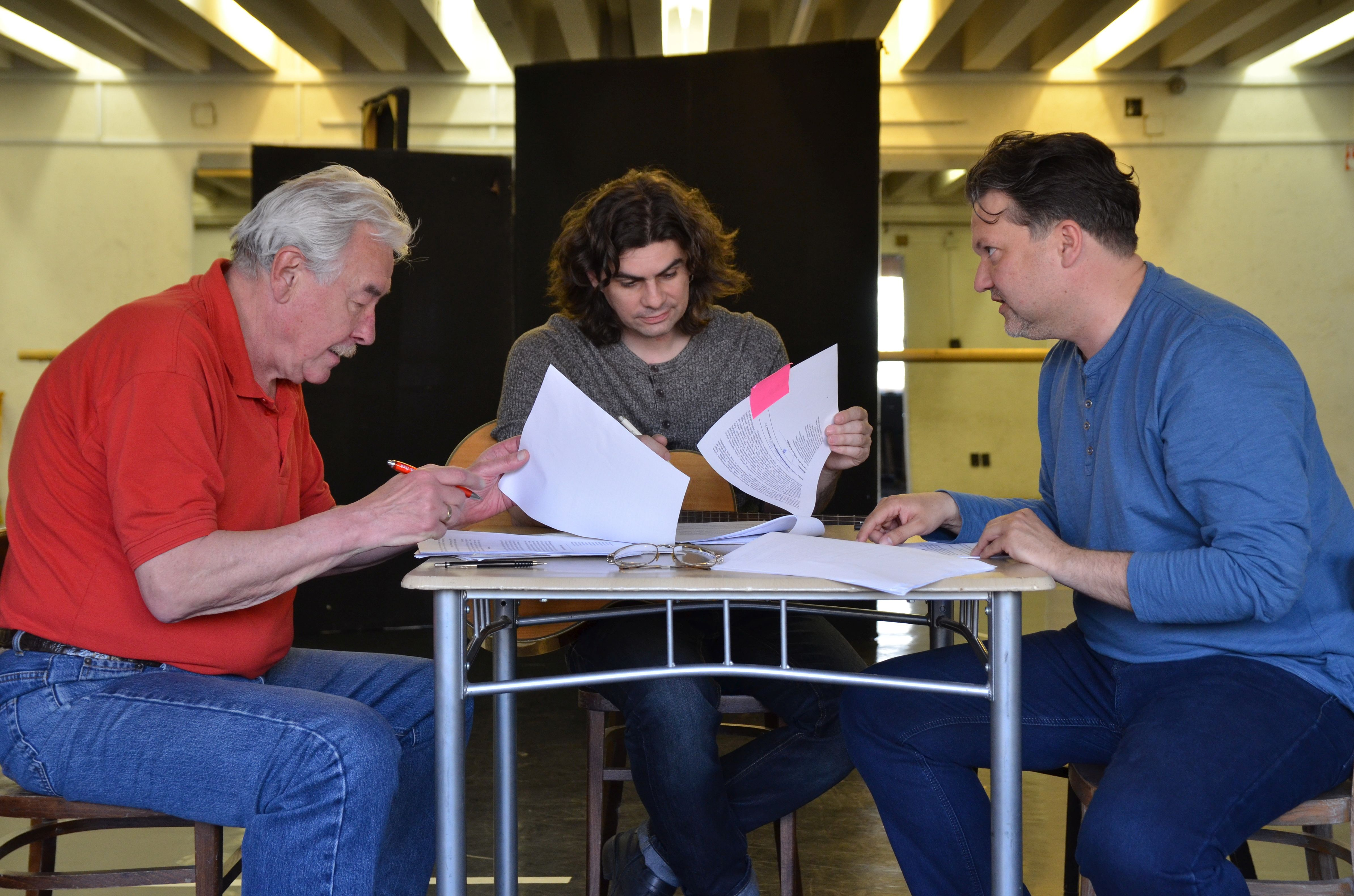 Katona János színművész (1949–2015), Dóka Attila zenész és Szabó Zoltán Attila rendező 2014-ben (Ottlik est, József Attila Színház)